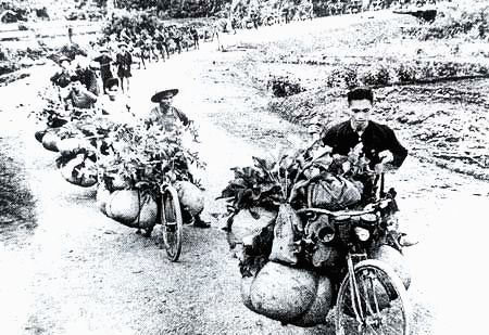 Dân công